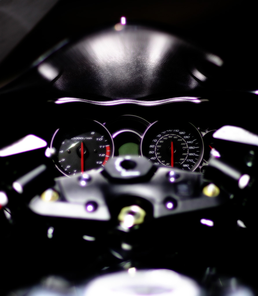 Suzuki Hayabusa GSX1300R instruments